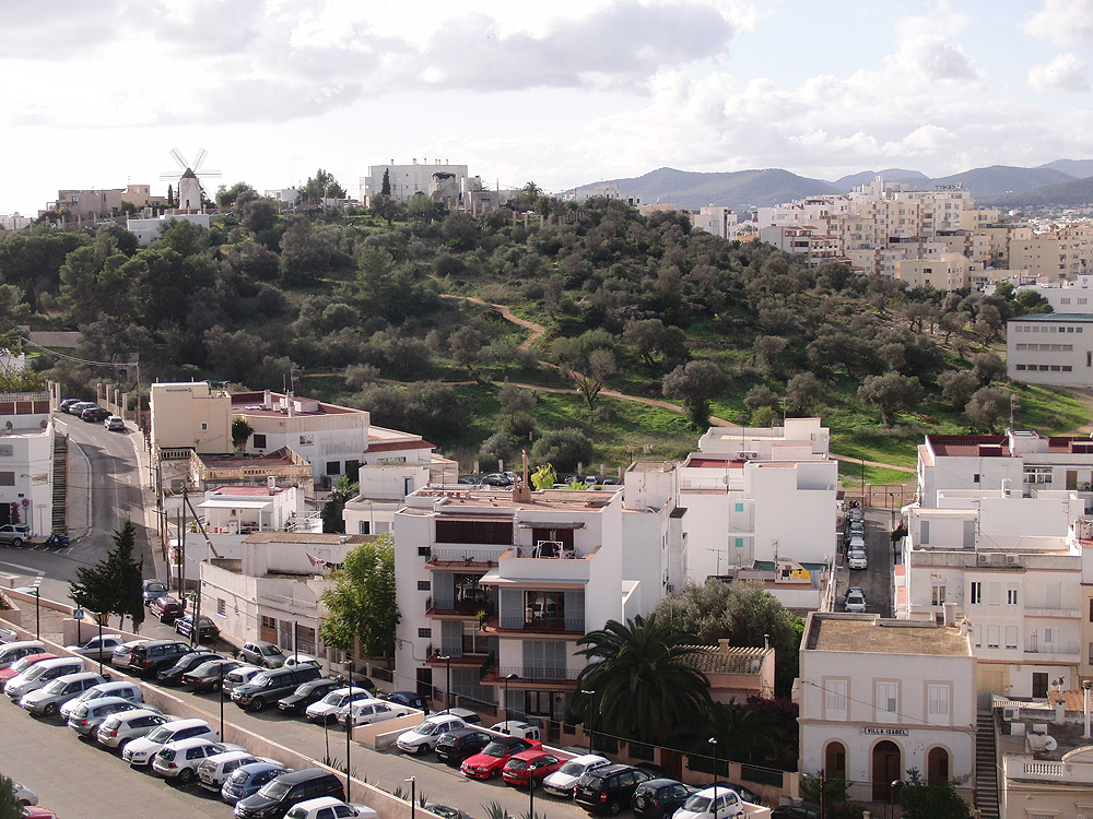 Vista del puig des Molins, la necròpolis púnica d'Eivissa